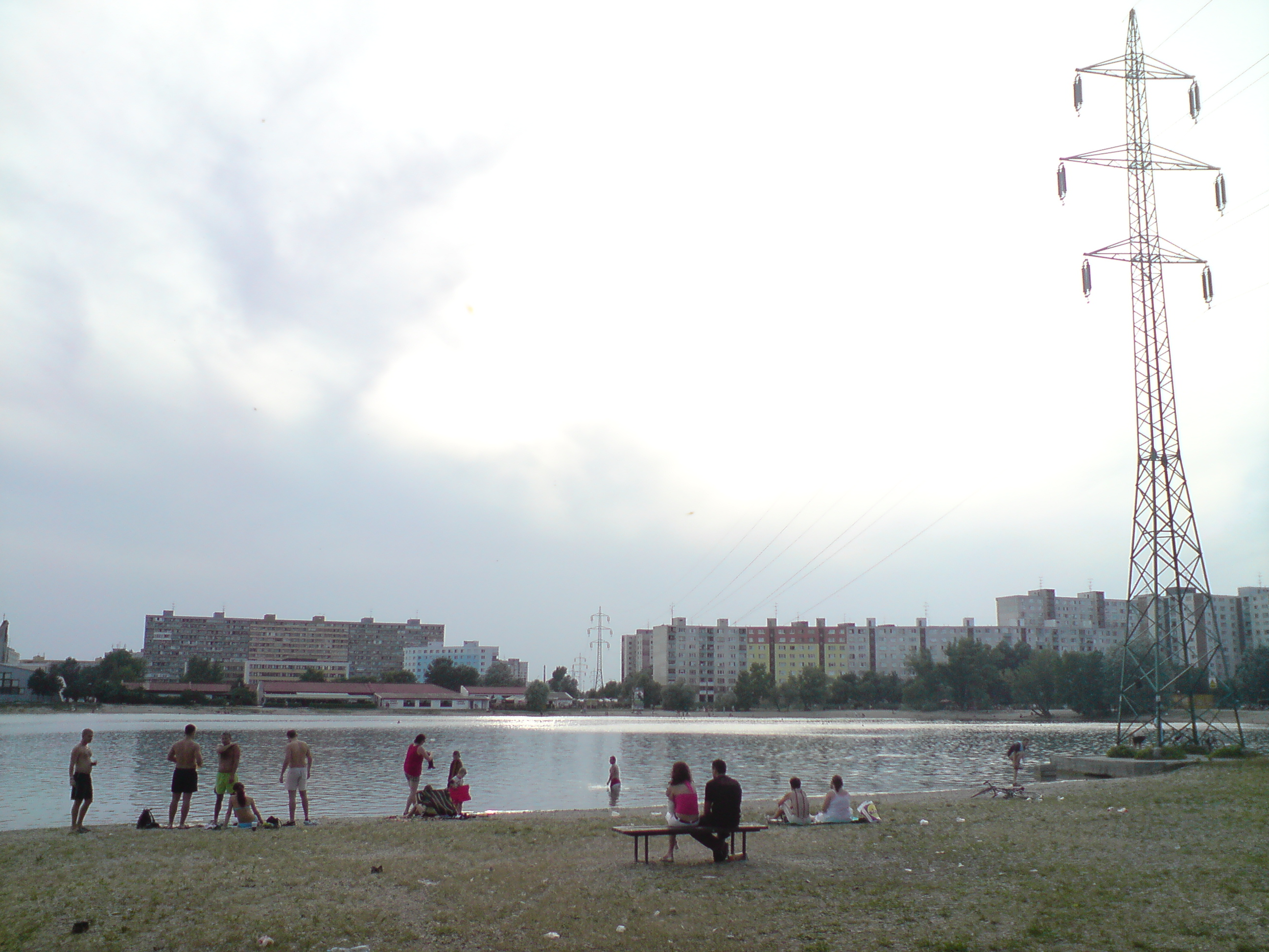 Veľký Draždiak